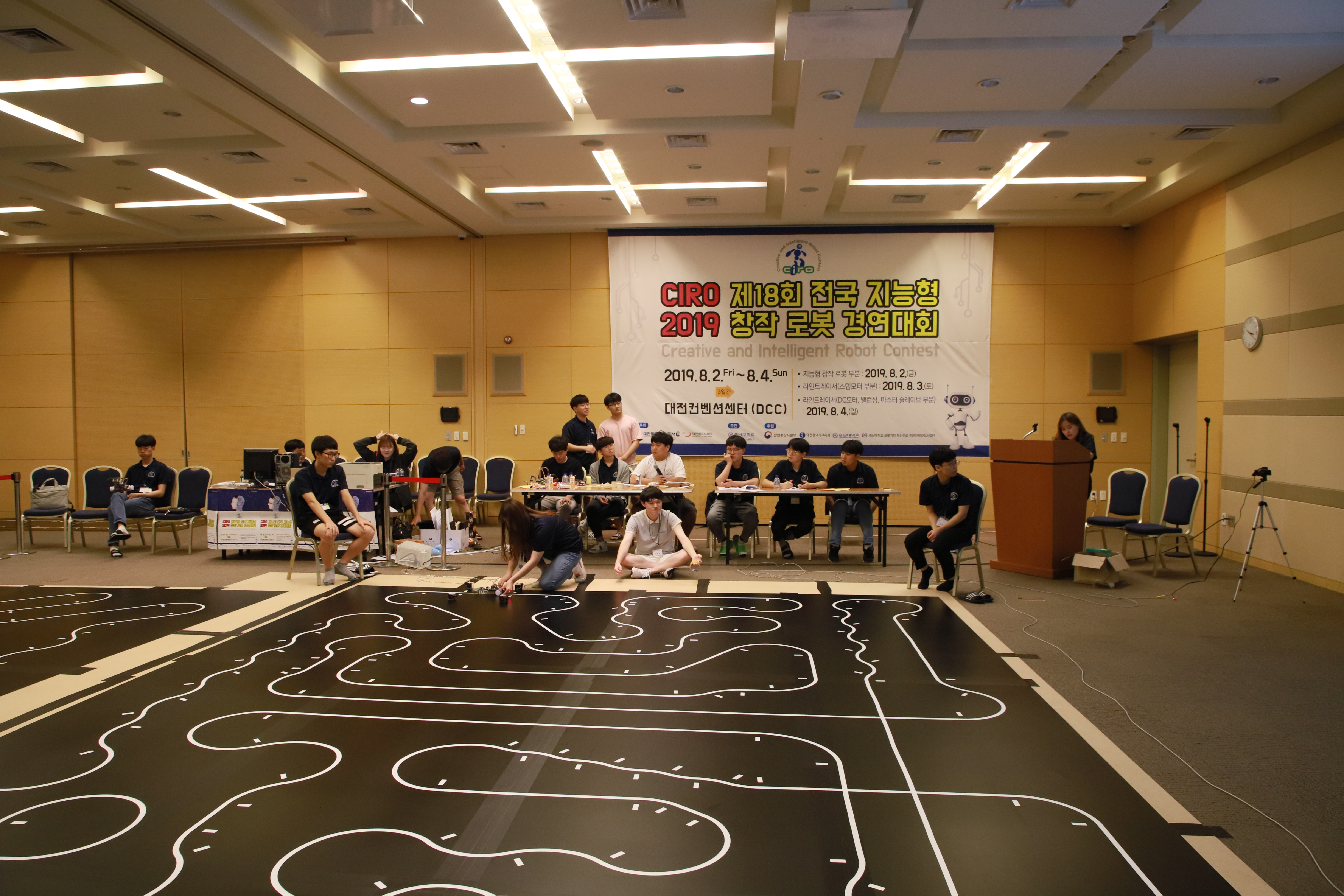 2019 대전로봇융합페스티벌 창작로봇경진대회